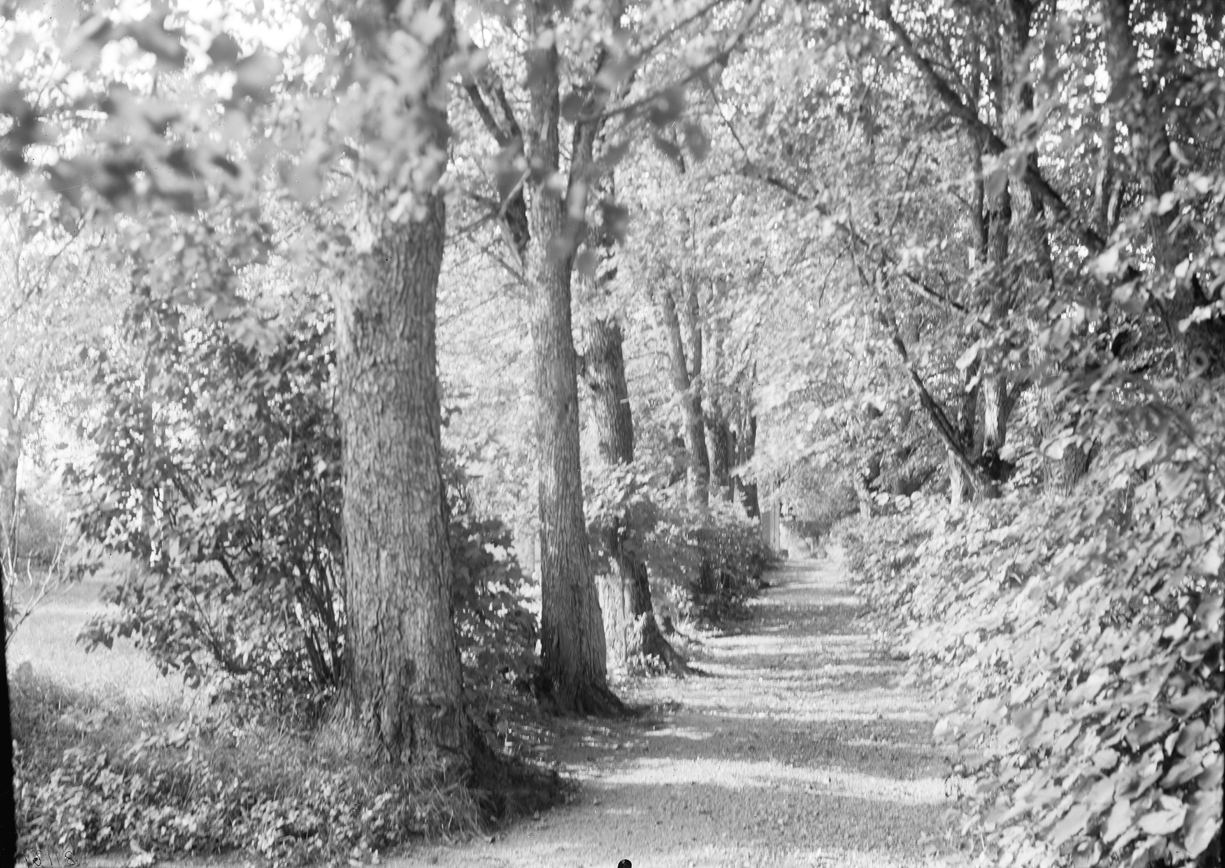 Hämeenkylän kartanon puiston käyttävä